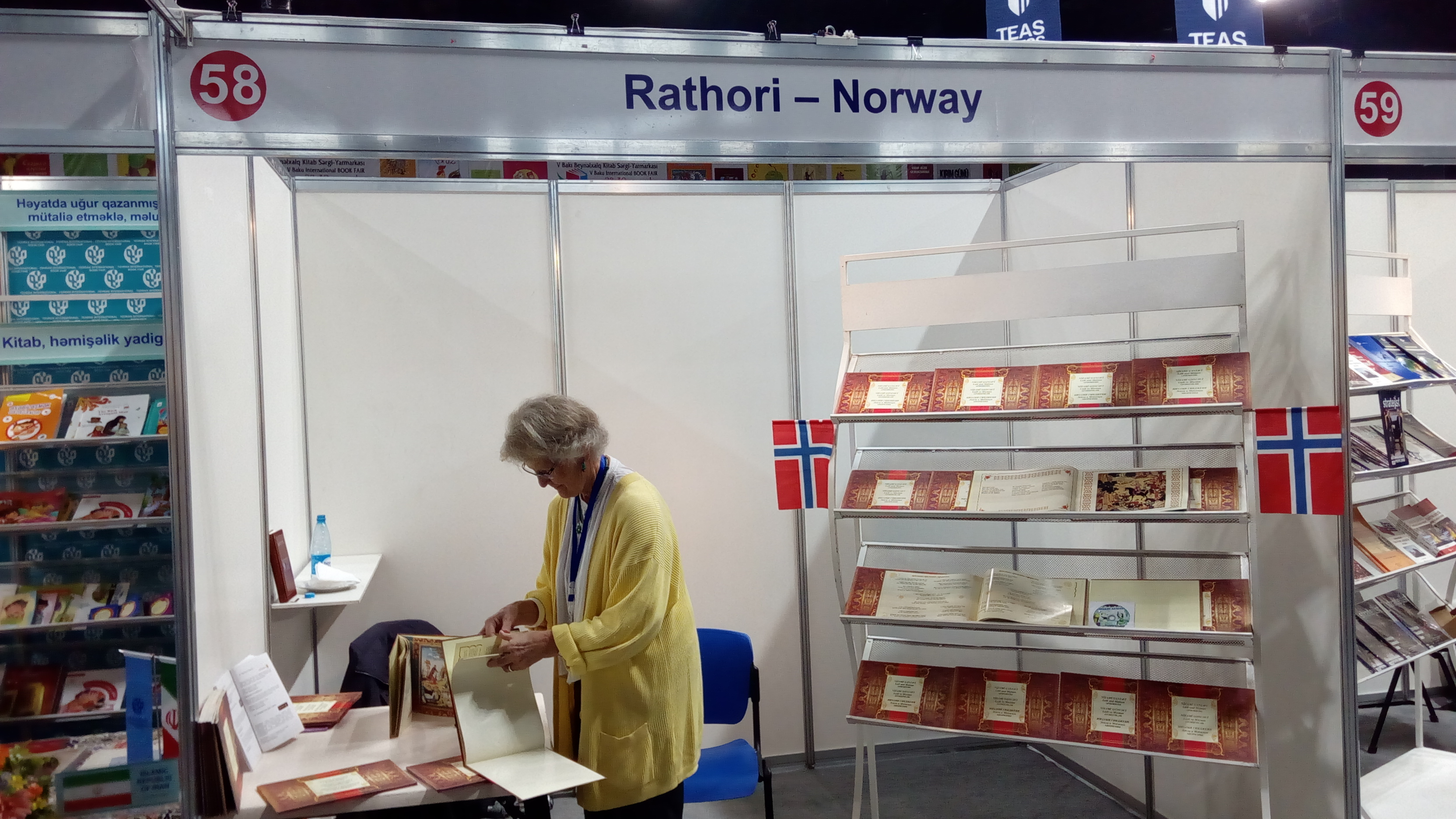 V Bakı Beynəlxalq Kitab Sərgi-Yarmarkası